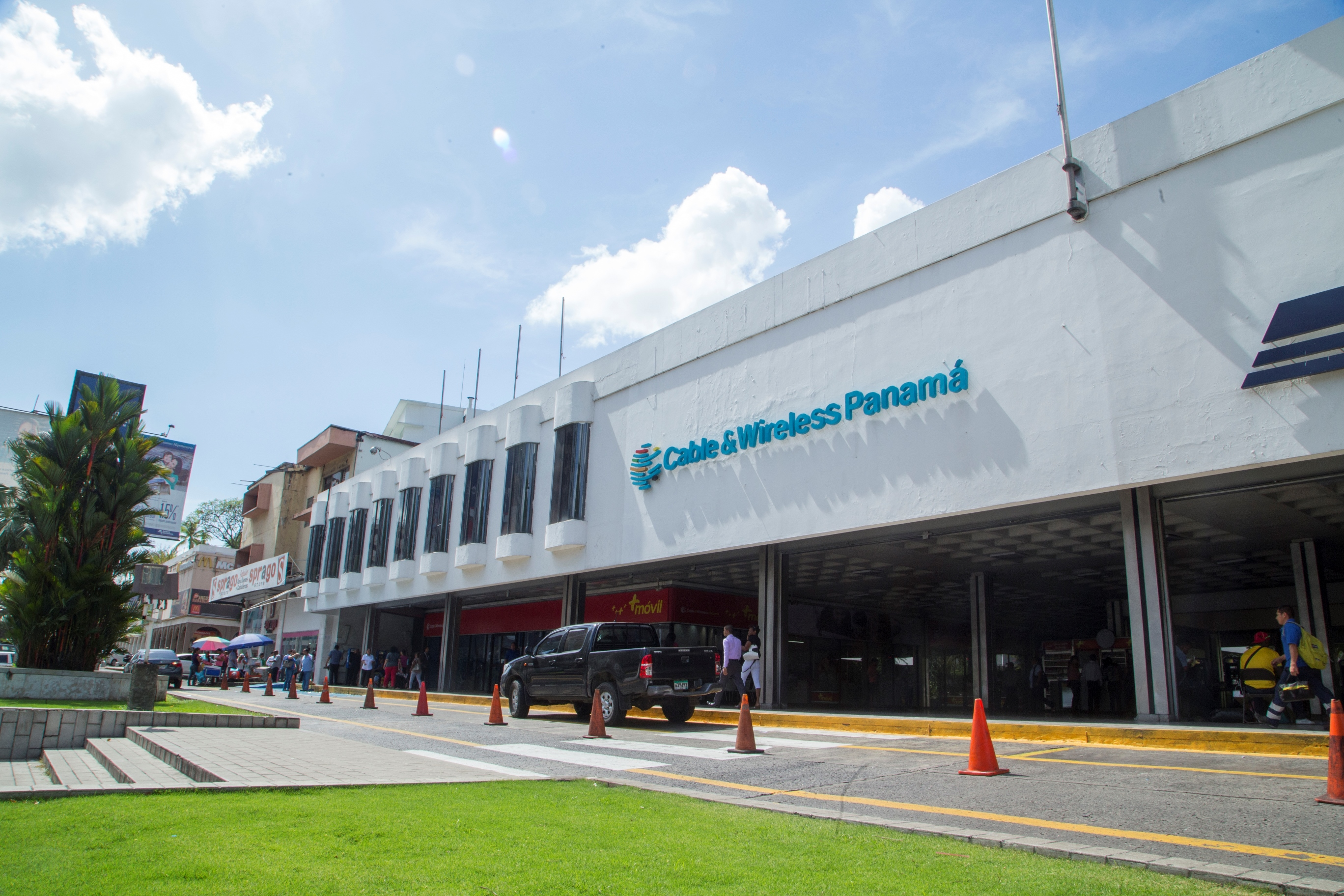 Cable & Wireless Panamá, Casa Matriz, Via España